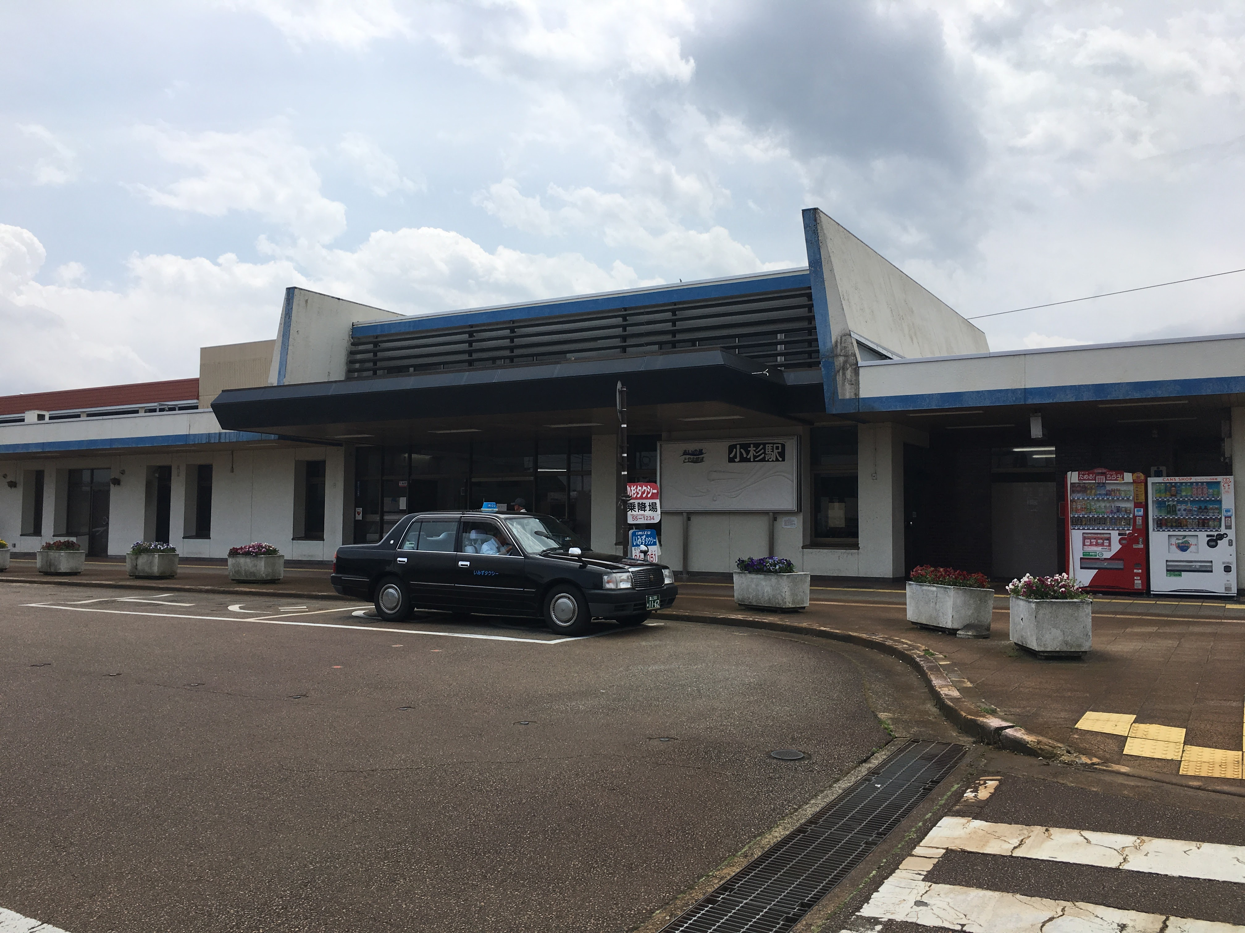 あいの風とやま鉄道小杉駅駅舎（北口）